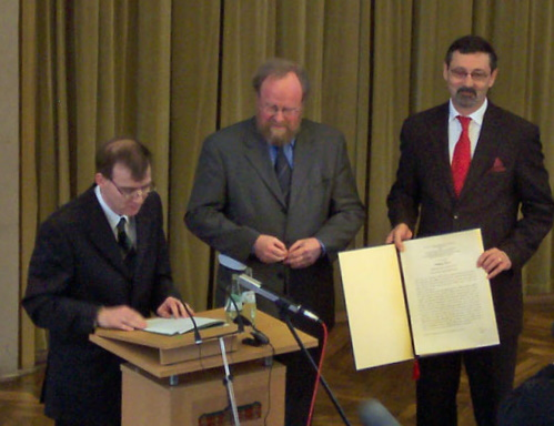 Wolfgang Thierse bekommt die Ehrendoktorwürde in Münster